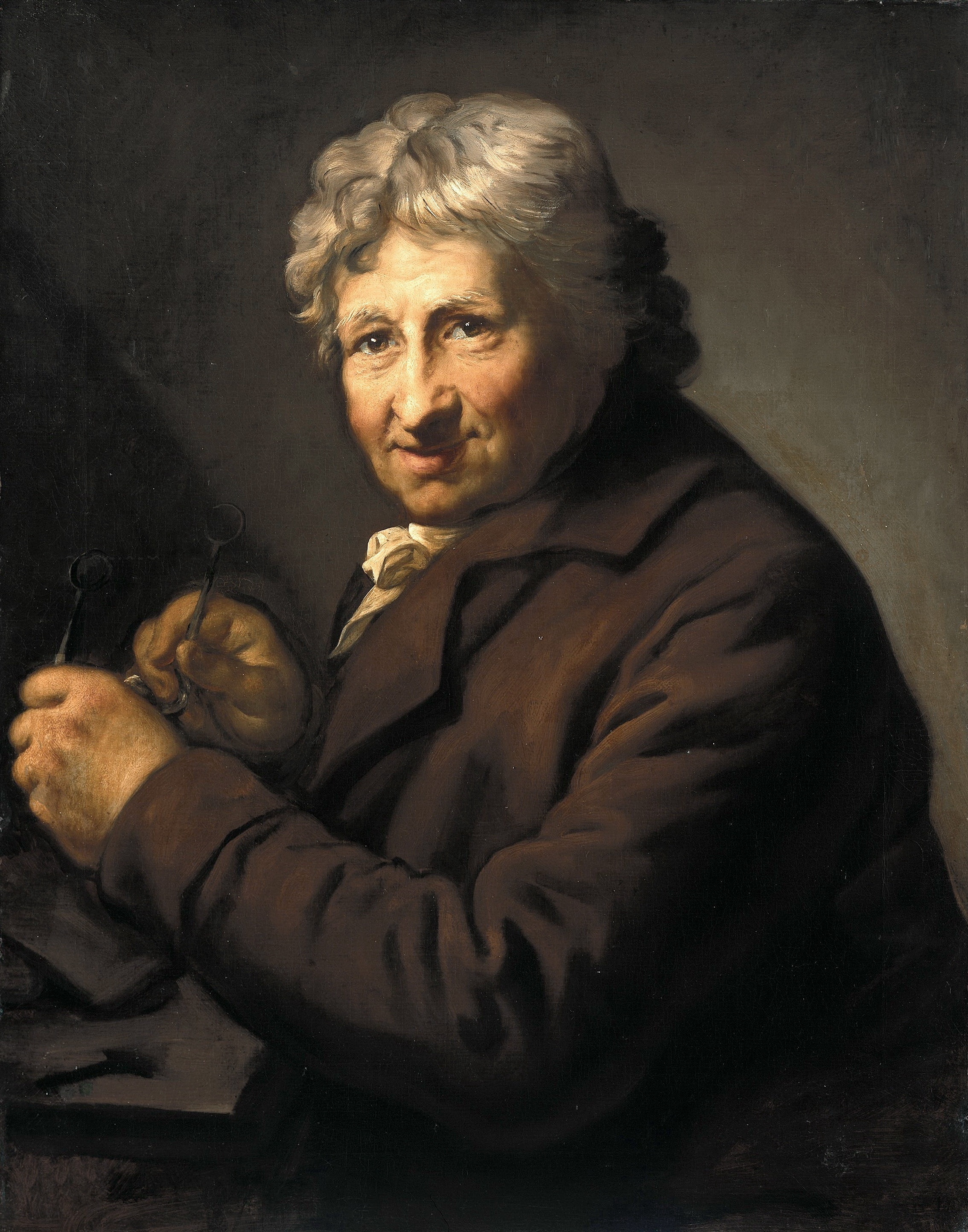 Replik eines signierten Bildes von 1800 in den Städtischen Kunstsammlungen Augsburg, Inv. Nr. L 721 (Leihgabe der Bayerischen Staatsgemäldesammlungen)